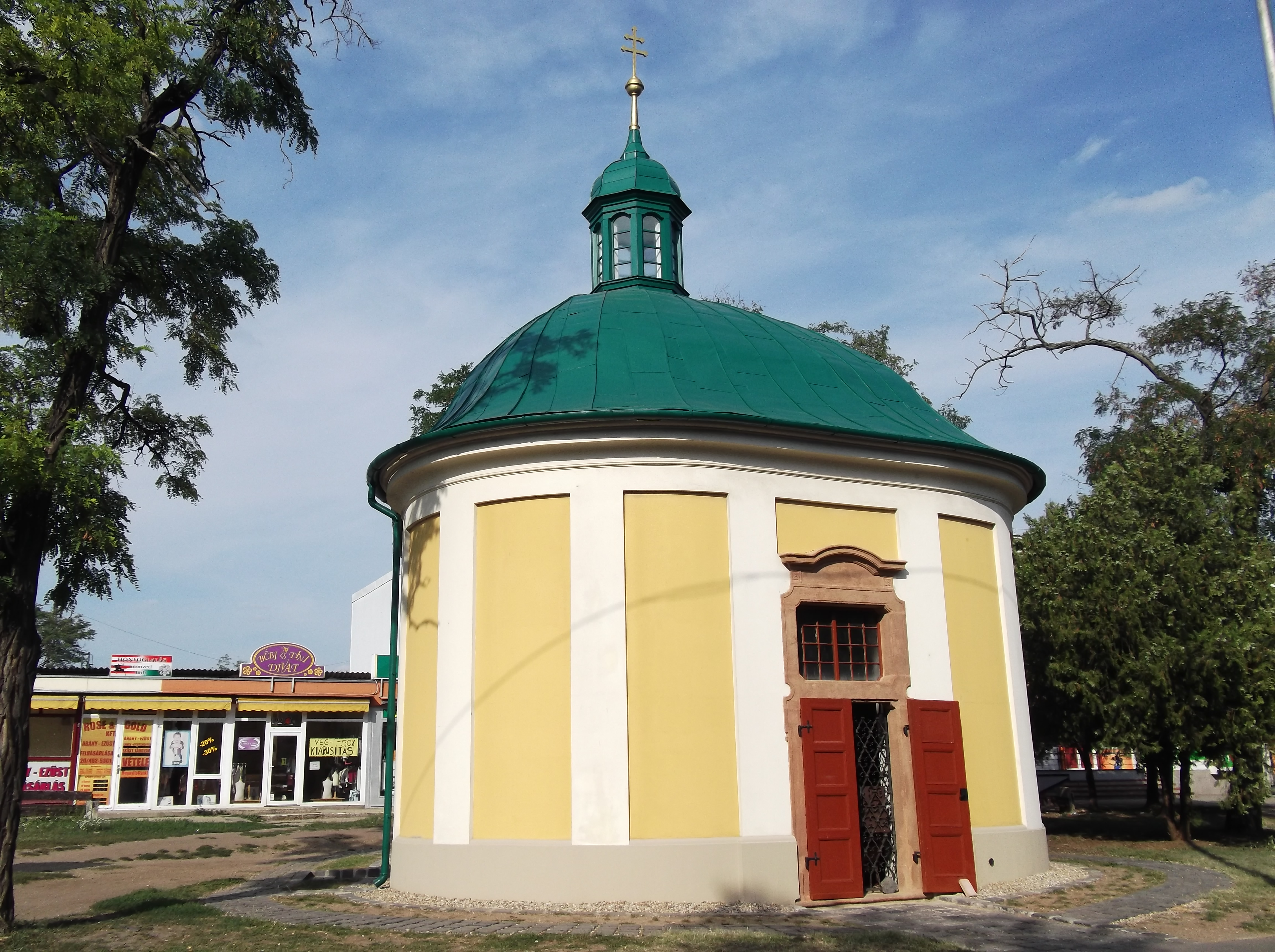 Rókus Chapel